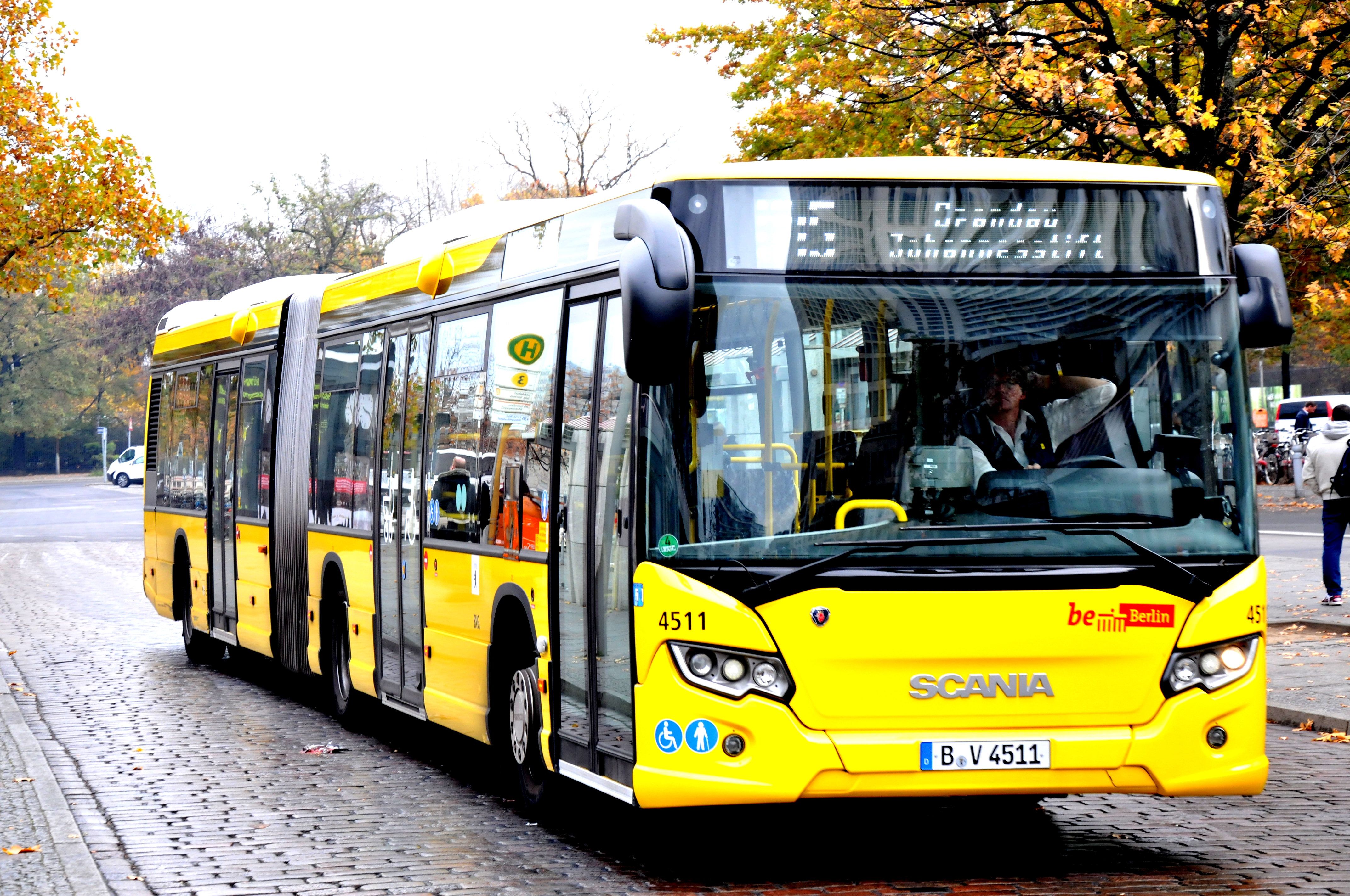 Berliner Verkehrsbetriebe (BVG) bus 4511 van het type Scania Citywide LFA als lijn 245 bij Station Berlin Zoologischer Garten.